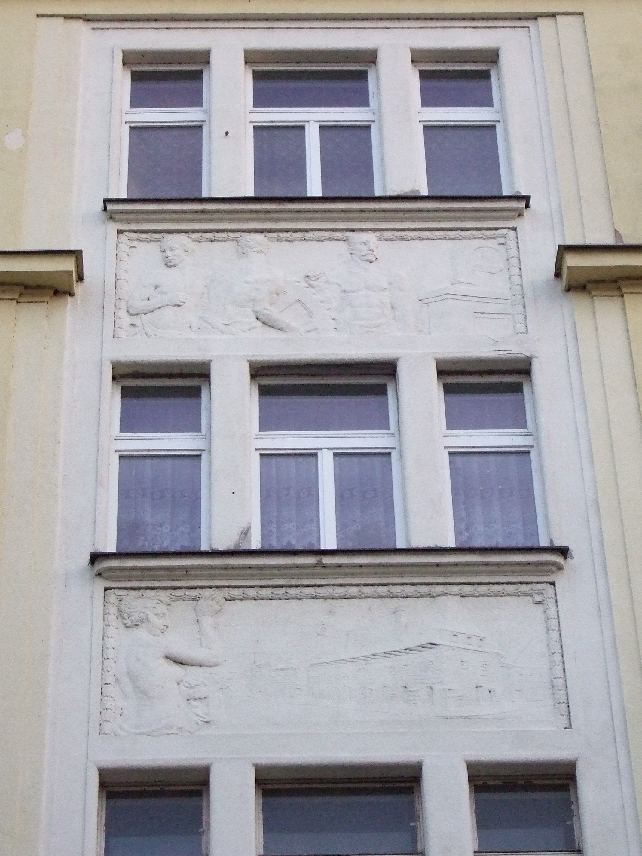 České Budějovice - Edificio